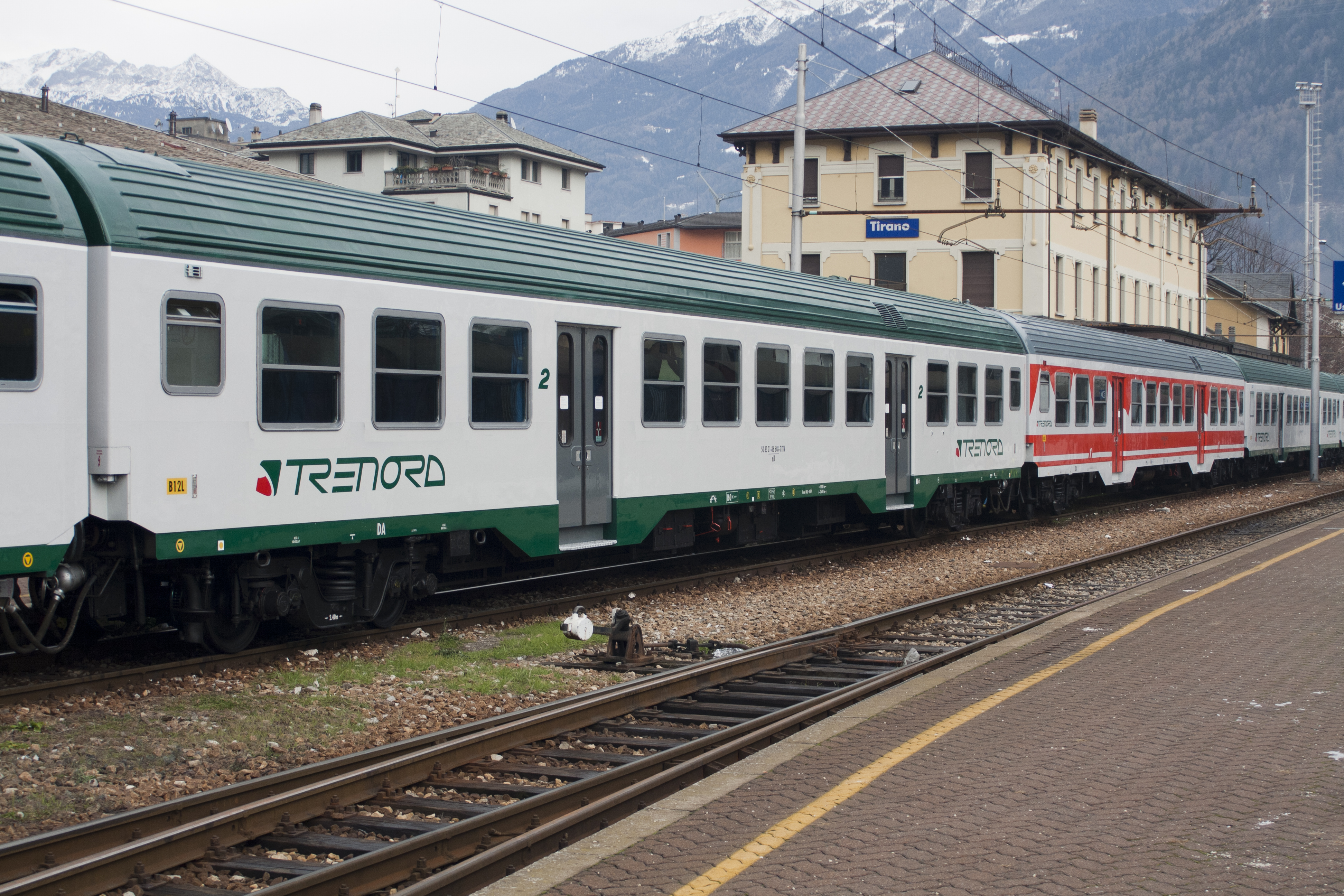 Carrozza MDVC livrea TN